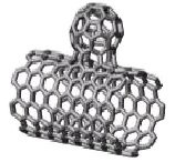 NanoBud